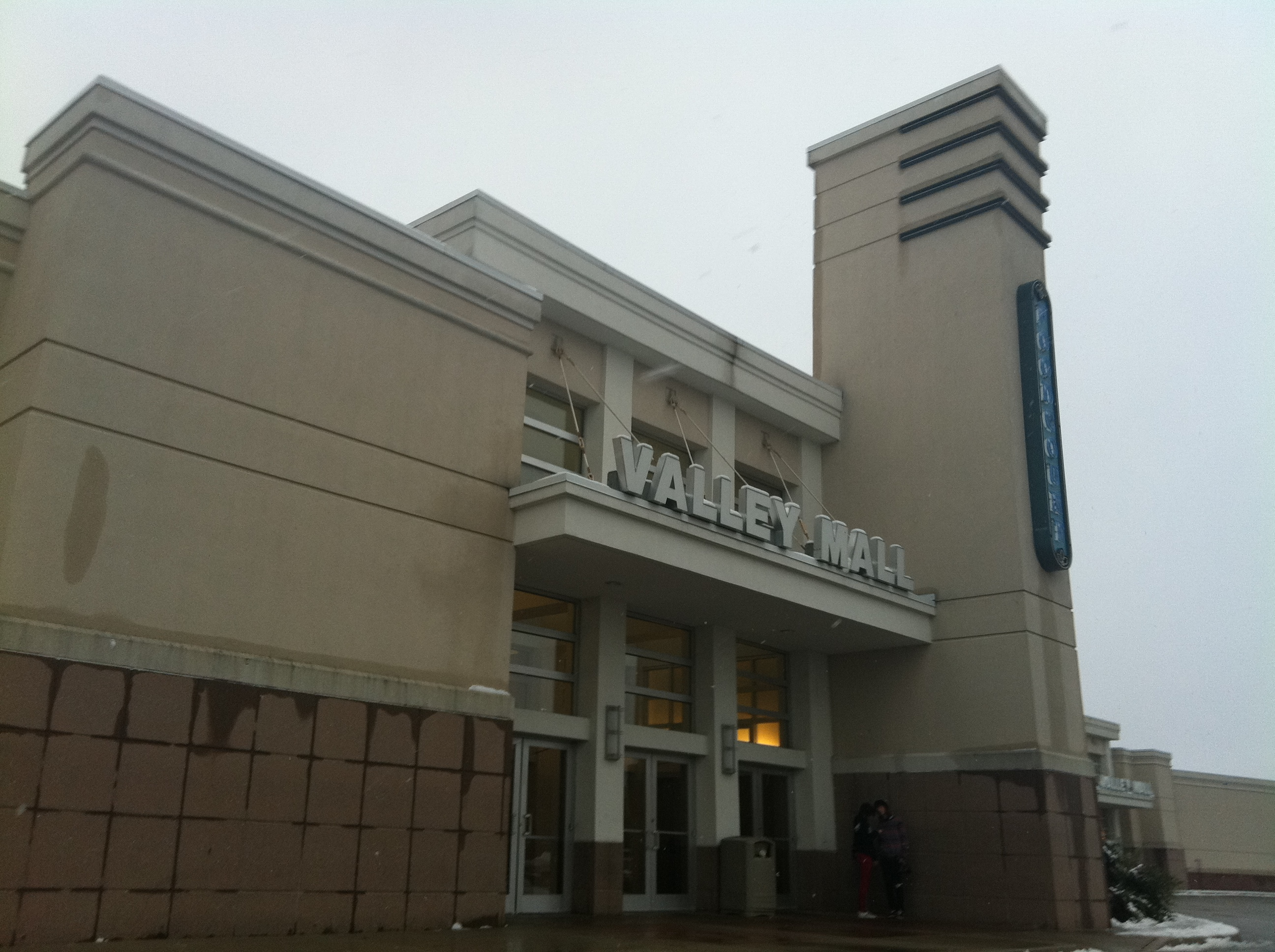 Valley Mall